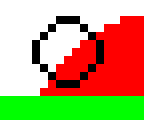 Voorbeeld met vergroten, eigen werk.